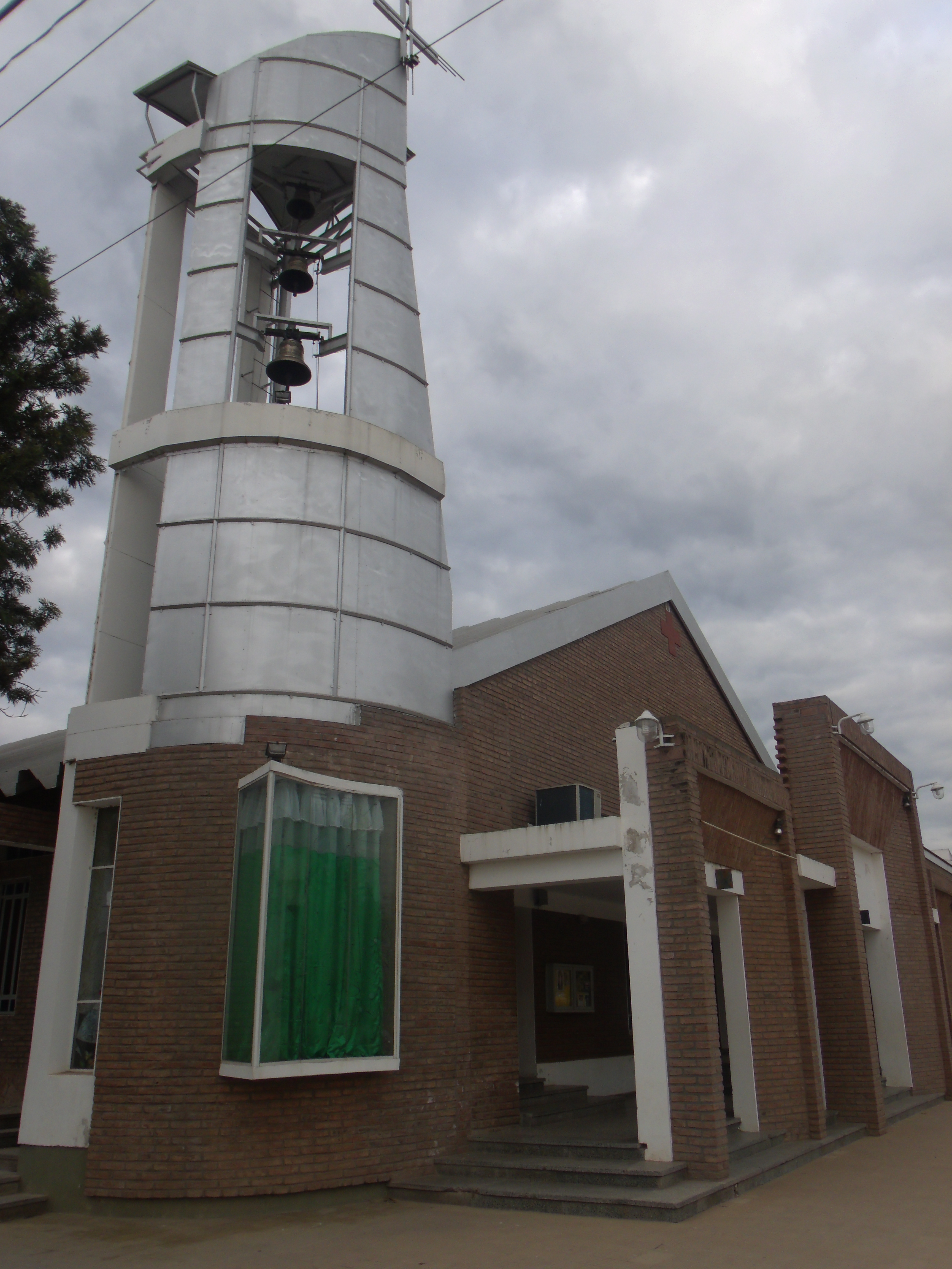 Templo católico de Catelli, Chaco, desde la izquierda